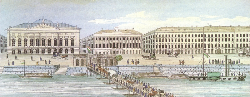 A Buda és Pest között működött hajóhíd pesti hídfője a Redoute, a pesti Vigadó épülete előtt. „Egészen különleges helyzete van a magyar kartográfiában Carlo Pino Vasquez gyönyörű díszalbumának,… Vasquez nem magyar, hanem spanyol származású, de Budapesten élt, s művét magyar nyelven adta ki. Ez az első, s mindeddig páratlan kartográfiai díszművünk... Metszetei művészi értékűek, leheletfinomságúak, s egész kartográfiánkban talán legszebbek... (Fodor Ferenc: A magyar térképírás. 257. old.)